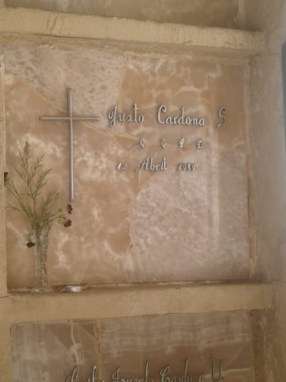 dentro del mausoleo